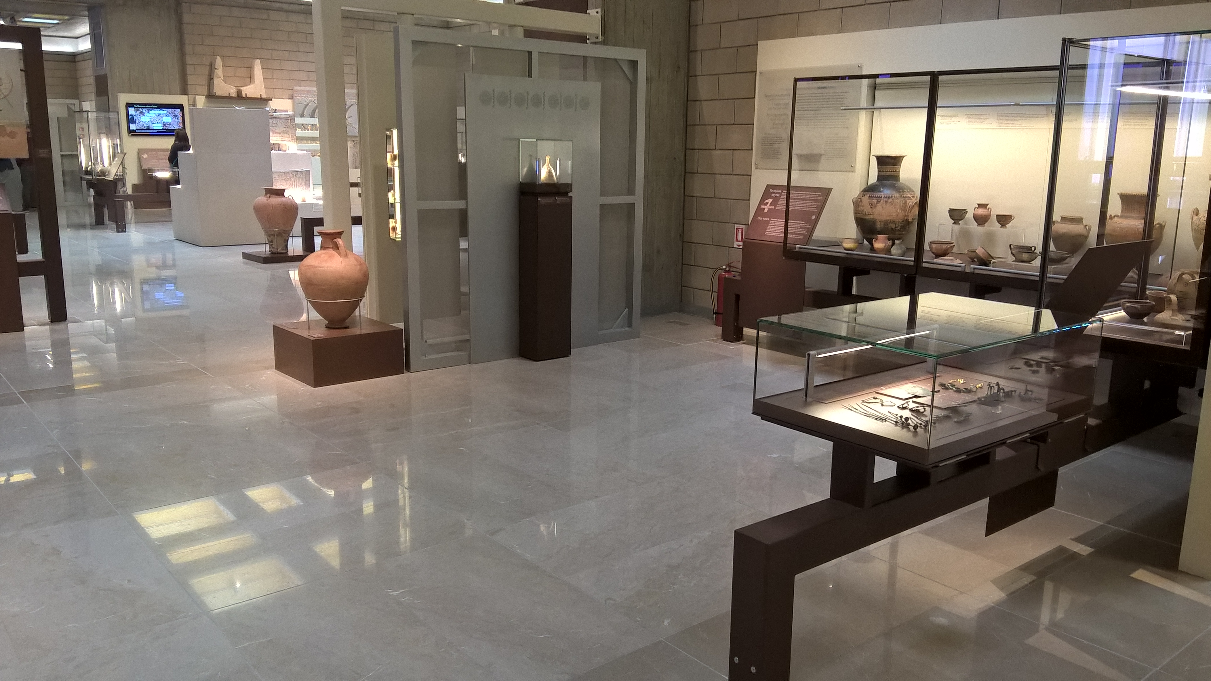 Από το εσωτερικό του Μουσείου Θήβας